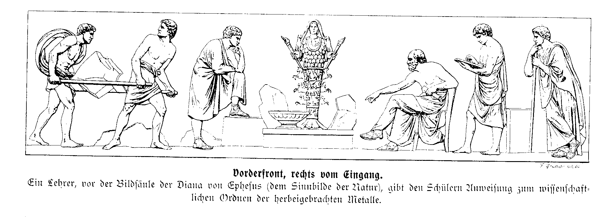 Der Münzfries von Johann Gottfried Schadow, Teil 2.